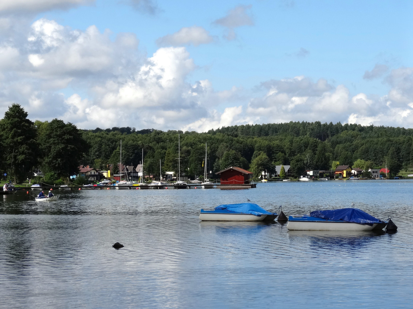 Plaża nad jeziorem Charzykowskim w Charzykowach